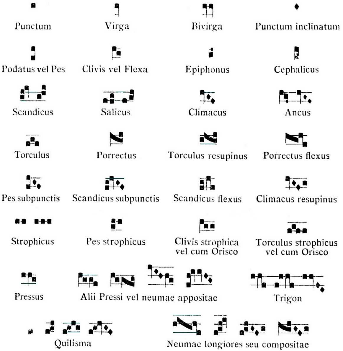 Tableau explicatif des noms de Neumes, dans la préface de l'édition vaticane du Graduel (1908)